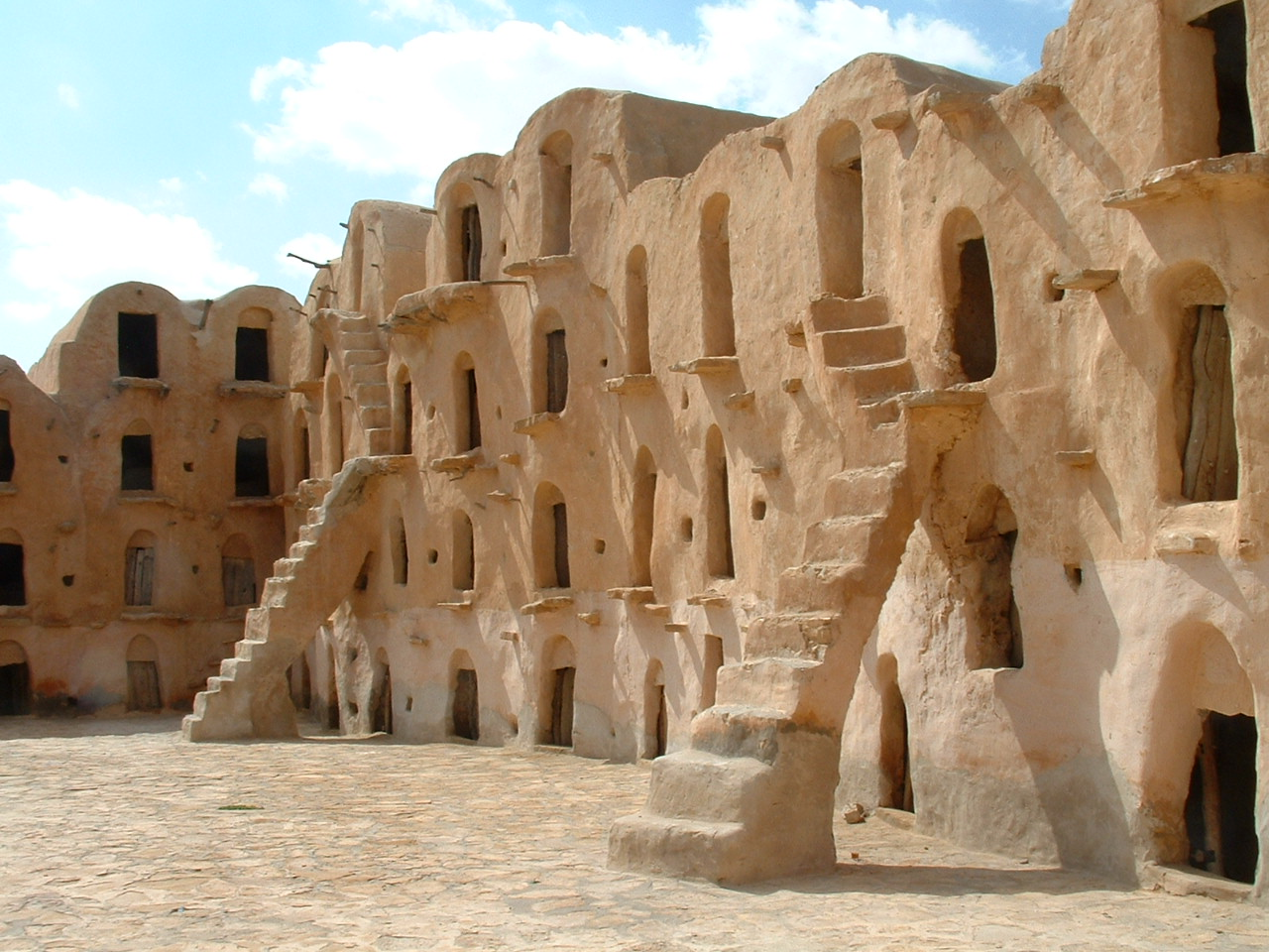 Ksar Ouled Soltane en Tunisie